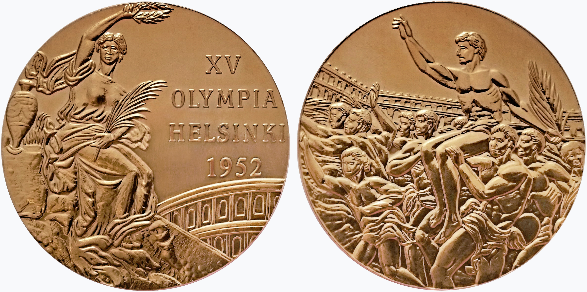 Goldmedaille der Olympischen Sommerspiele 1952 in Helsinki (Vorder- und Rückseite